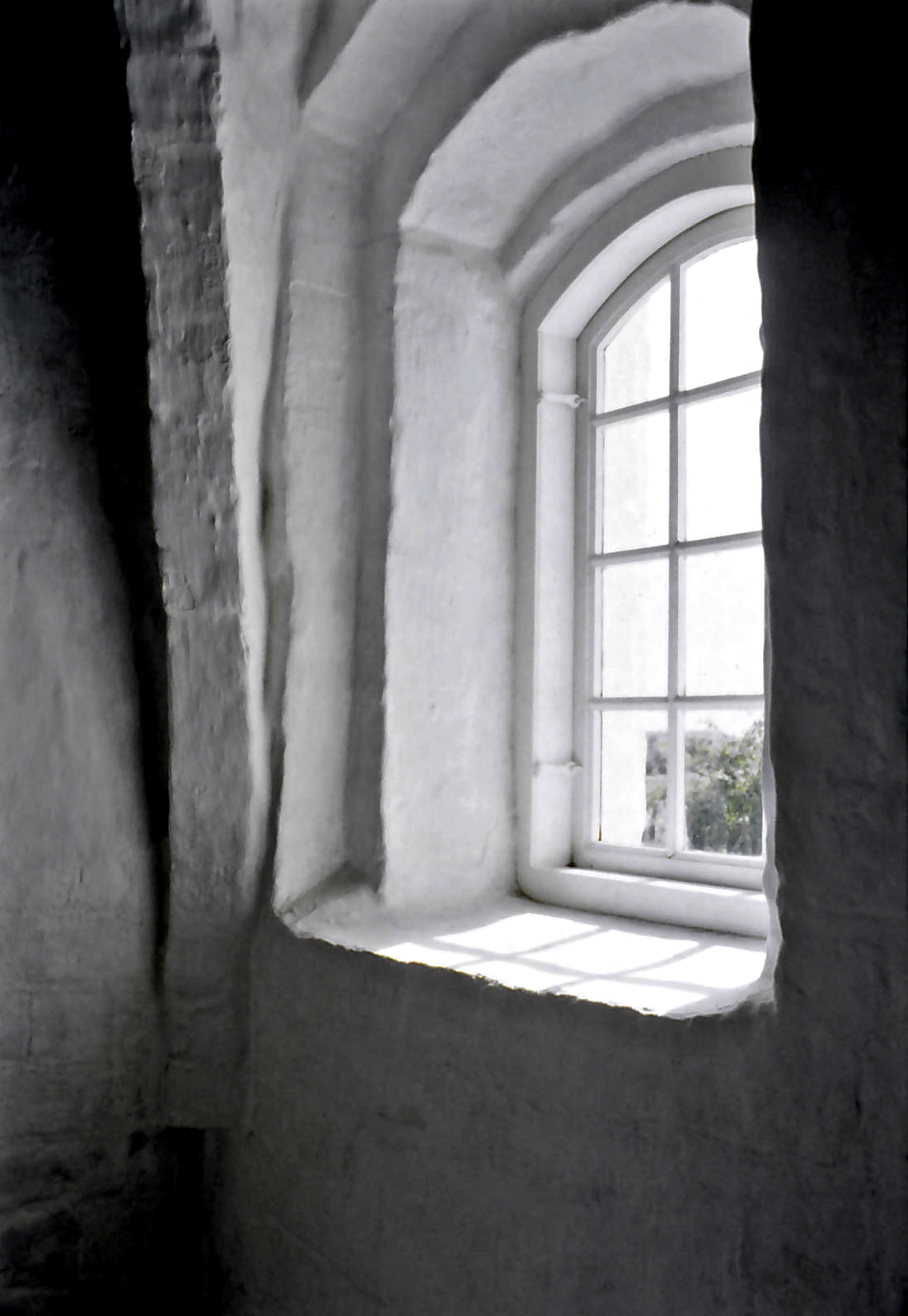 sydvendt kirkevindue, Toxværd Kirke.